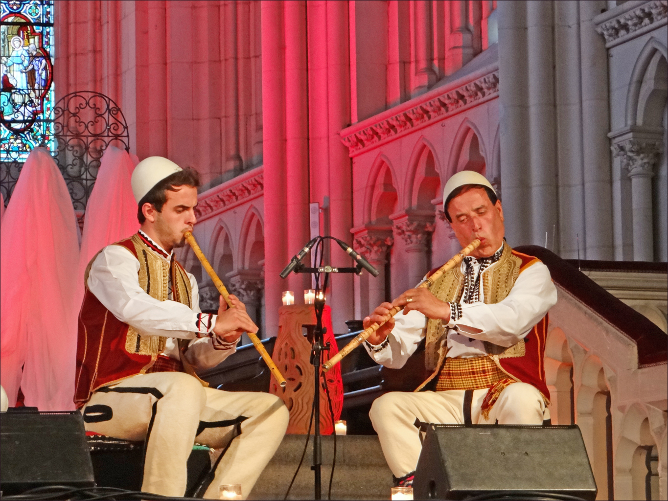 Flûtes Kavall des bergers de Macédoine dans l'Abbatiale de Saint-Florent-le-Vieil A droite, le maître Sallah Shabani et à gauche Adnan Aliu jouant de flûtes longues obliques appelées Kavall. Le Kavall sert à accompagner le chant, il est joué traditionnellement par paires chez les bergers albanais, l'un sert de bourdon et l'autre fait la mélodie. Article de Wikipedia: Concert "Chant et flûtes des bergers" La tradition albanaise de "musique de source" à travers chants épiques et lyriques à deux vois et flûtes longues kavall. dans le cadre du festival Les Orientales Musiques et traditions d'Orient Saint-Florent-le-Vieil